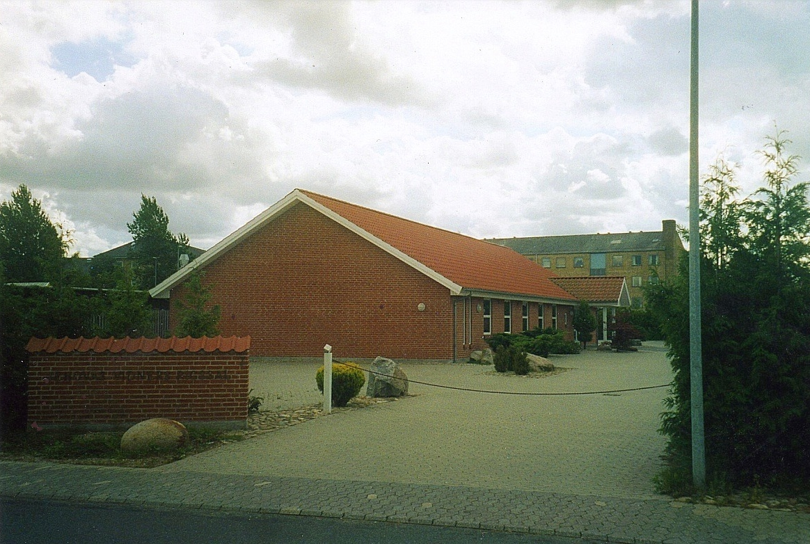 Jehovas Vidners Rigssal, Furesø Kommune.